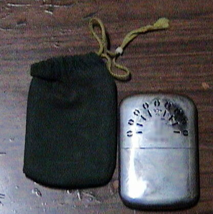 ハクキンカイロ(2005年4月 MASA自宅にて撮影) ※意匠（ロゴ）部分を加工しています